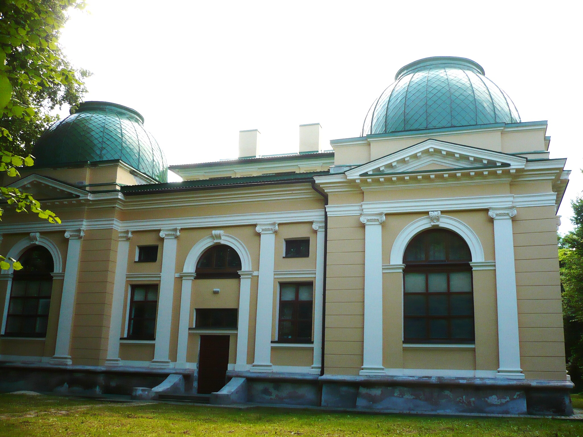 Lwów. Pałac Sztuki w Parku Stryjskim